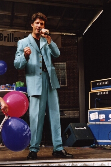 Axel Becker; Stadtfest in Meppen von Peter Link